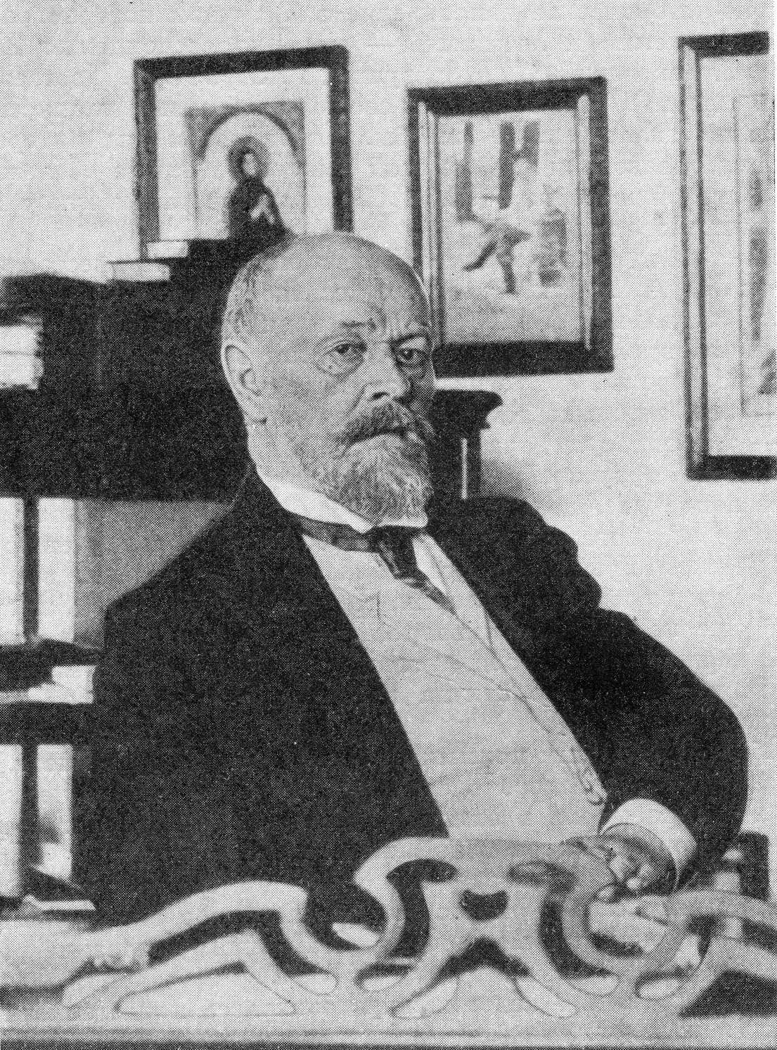 Фёдор Иванович Успенский — византист, академик Петербургской академии наук, Российской академии наук, АН СССР.